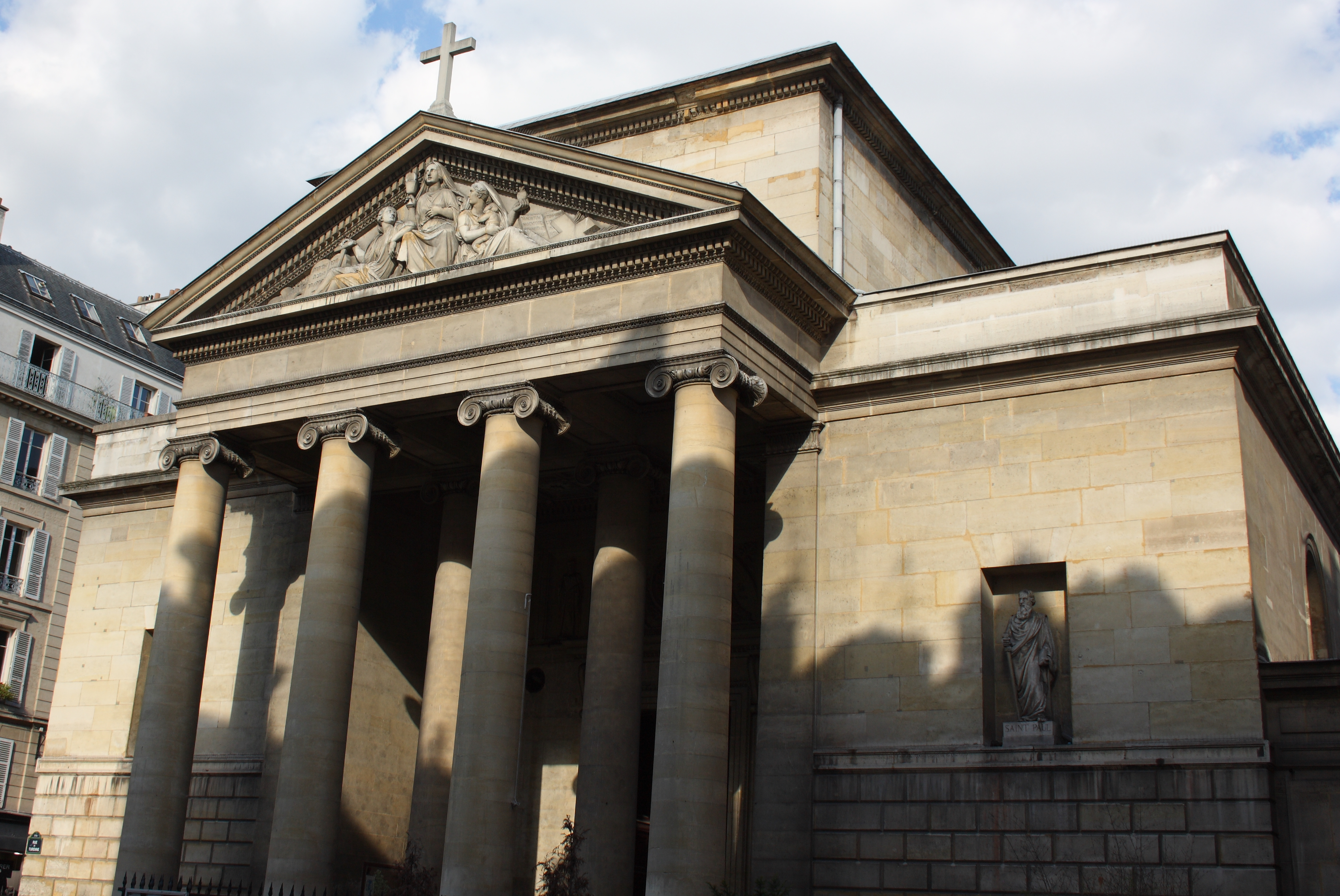 katholische Pfarrkirche Saint-Denys-du-Saint-Sacrement in Paris (3. Arrondissement), Eingangsfassade zur Rue Turenne